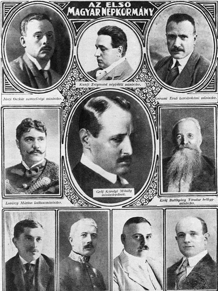 Az első magyar népkormány